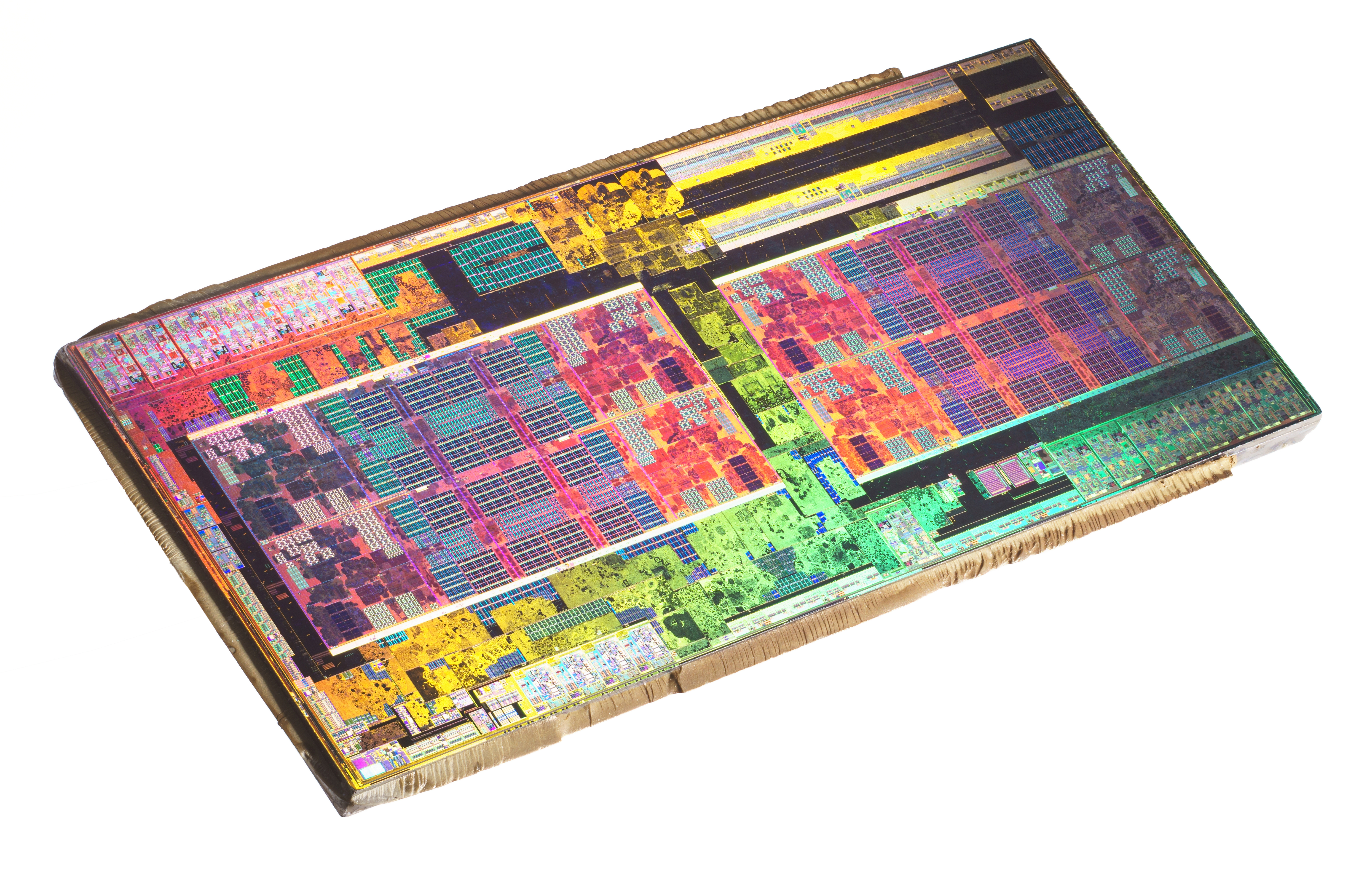 etched